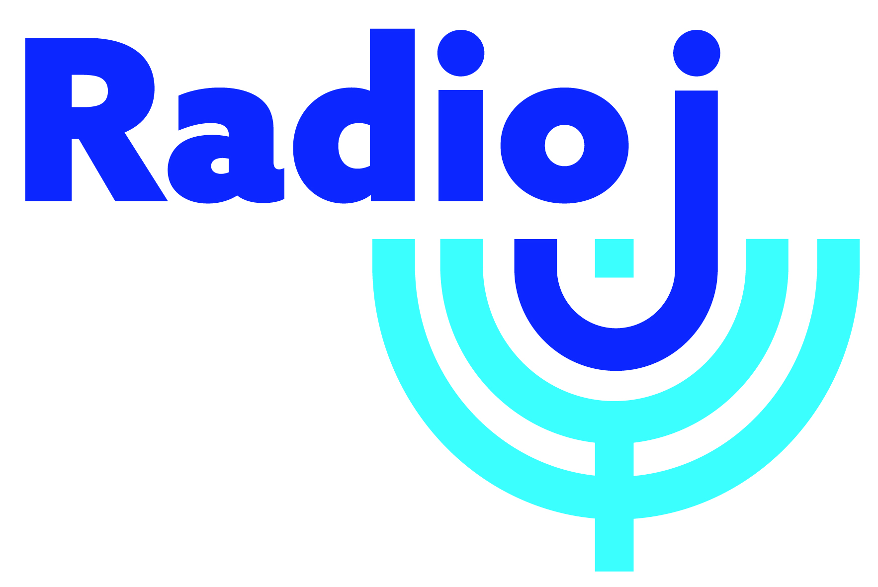 La première radio juive de France